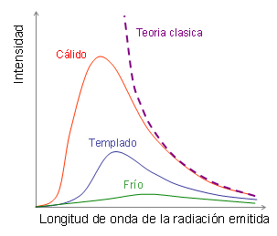 Gráfico mostrando la emisión de cuerpo negro y su variación con la temperatura. Un cuerpo a mayor temperatura emite mayor cantidad de radiación y a longitudes de onda más cortas mientras que un cuerpo a menor temperatura emite poca intensidad en longitudes de onda largas. La curva a trazos muestra las predicciones de las teorías clásicas del electromagnetismo y la física estadística. Imagen traducida de es::en:Image:Blackbodygraph.png.